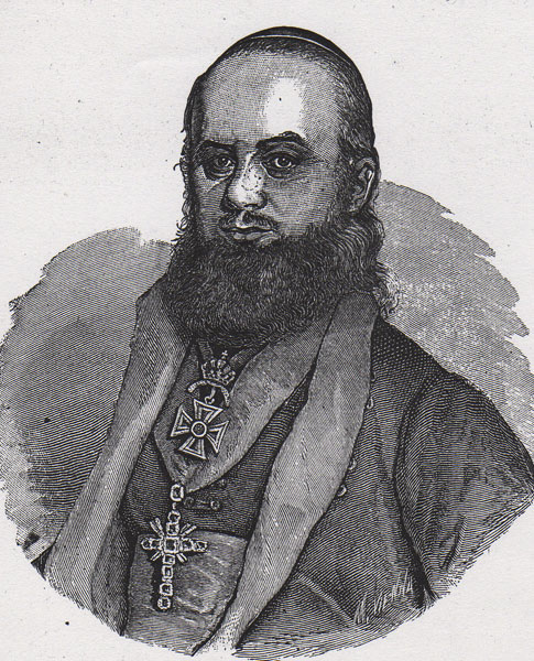 Платон Атанацковић